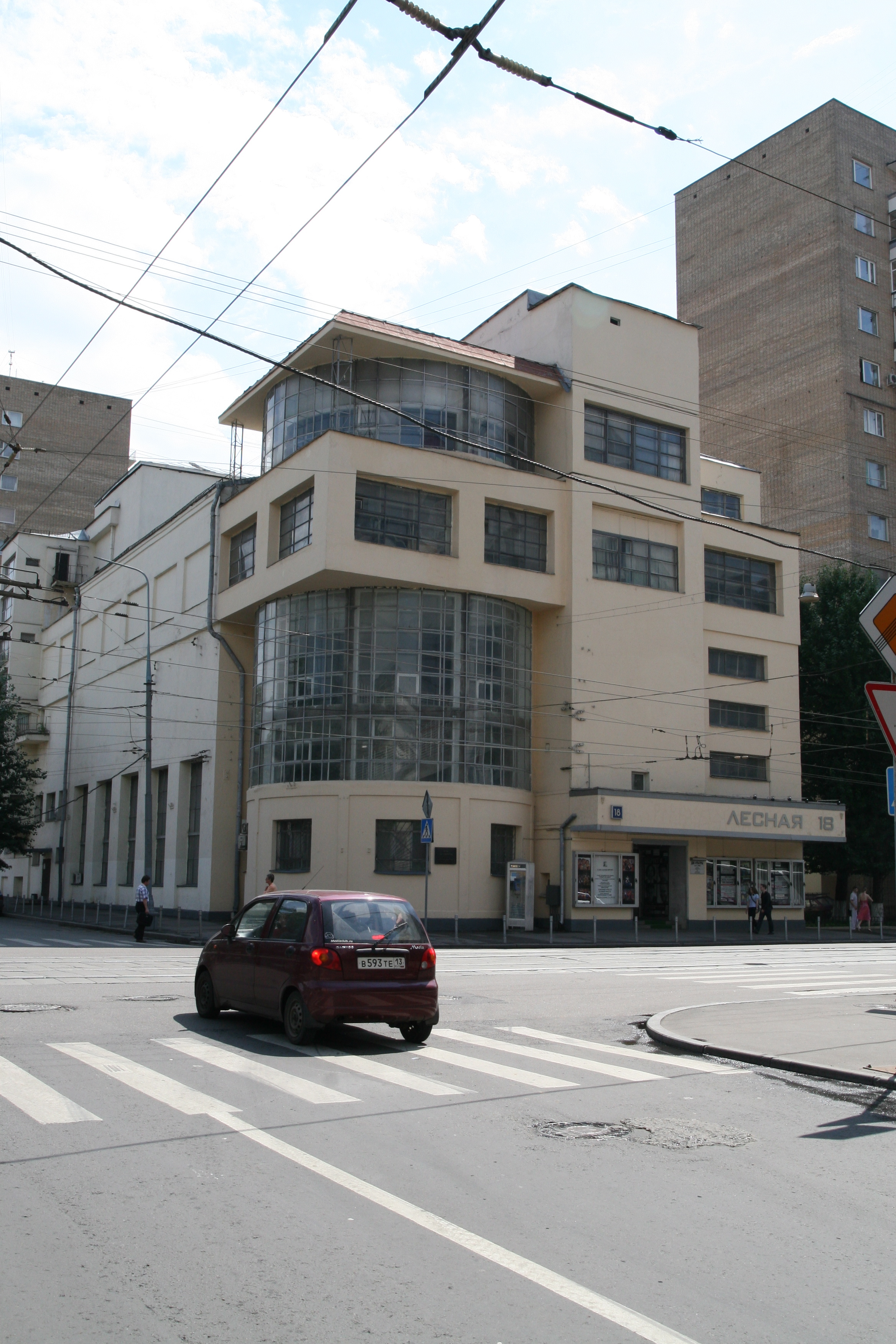 Дом культуры имени Зуева